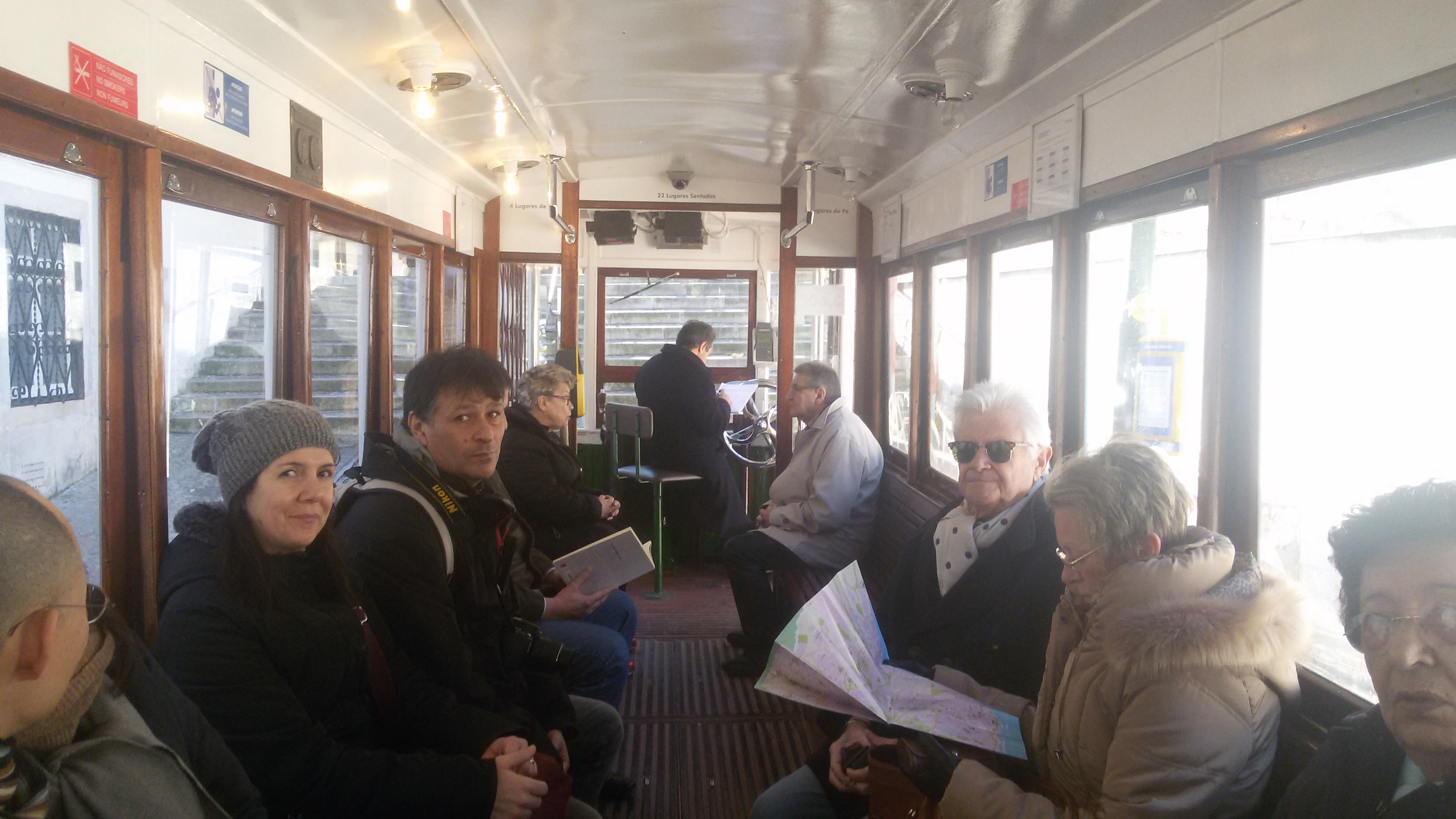 interno della funicolare di Gloria, Lisbona